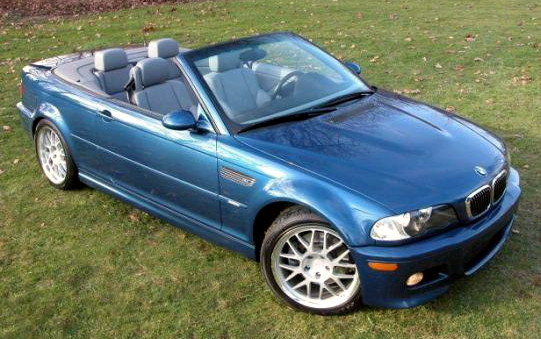 BMW E46 M3 convertible en azul BMW E36 M3 convertible blue with a gray top.